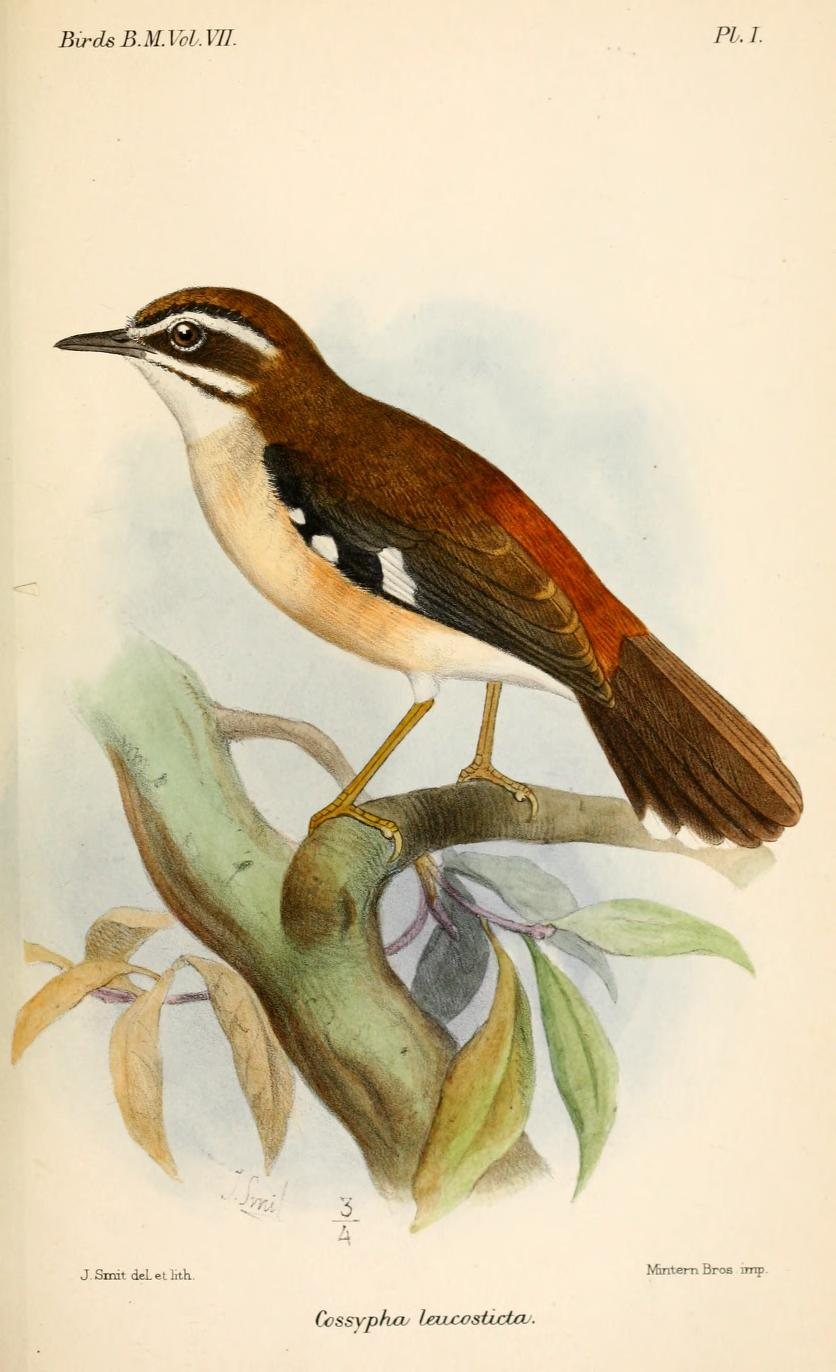 Cossypha leucosticta = Erythropygia leucosticta Forest Scrub-robin